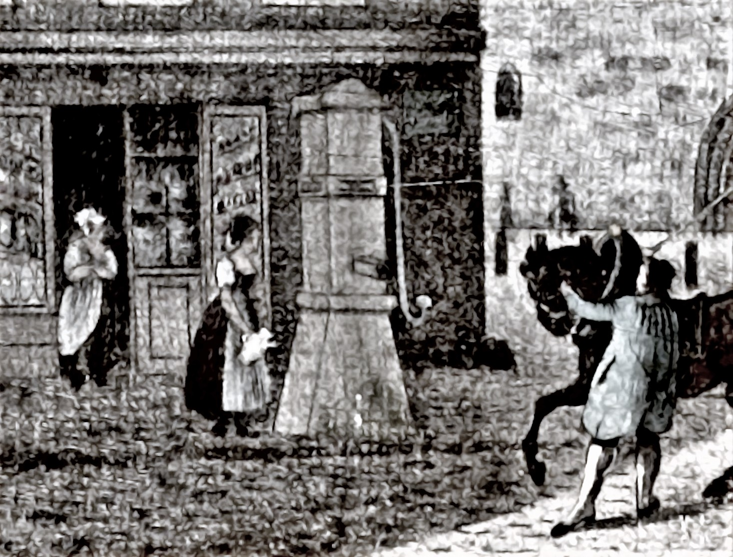 Probststraße 13 (#91, ♁Lage, ): Auf dem Gemälde Nikolaikirche von Westen[249] ist in der Bildmitte der Kesselbrunnen mit Gehäusekasten vor dem Haus im Schatten dargestellt, daneben eine Frau mit Krug. Nach der Karte von 1826 erfolgt der Blick von der Poststraße, rechts der „Scharrn“ (Marktstand) links das dreigeschossige Eckhaus Ausschnitt aus dem Gemälde Die Nikolaikirche in Berlin von Hintze Öl auf Leinwand mit 1827 datiert. Probstgasse 13. Mit der Zerstörung im Zweiten Weltkrieg und der Beräumung der Fläche um die Nikolaikirche wurde das Nikolaiviertel in Vorbereitung der 750-Jahrfeier auf annähernd mittelalterlichem Grundriss 1980 bis 1987 neu geschaffen. Der Brunnenstandort läge somit vor dem Haus Poststraße 25. Interessanterweise steht ein Typ-II-Lauchhammerbrunnen mit Tränkstein 2020 am Gehsteig (Straßenbrunnen Bezirk Mitte BrNr26) am nahezu gleichen Platz.